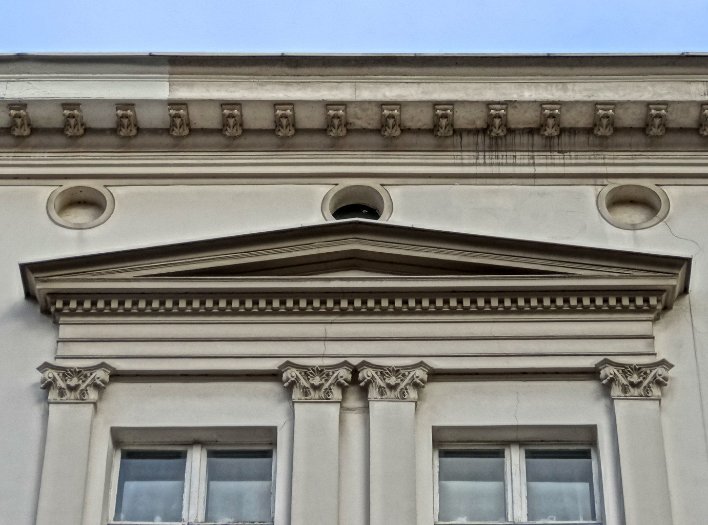 Kamienica ul. Długa 31, róg ul. Batorego w Bydgoszczy (kon. XVIII w.)